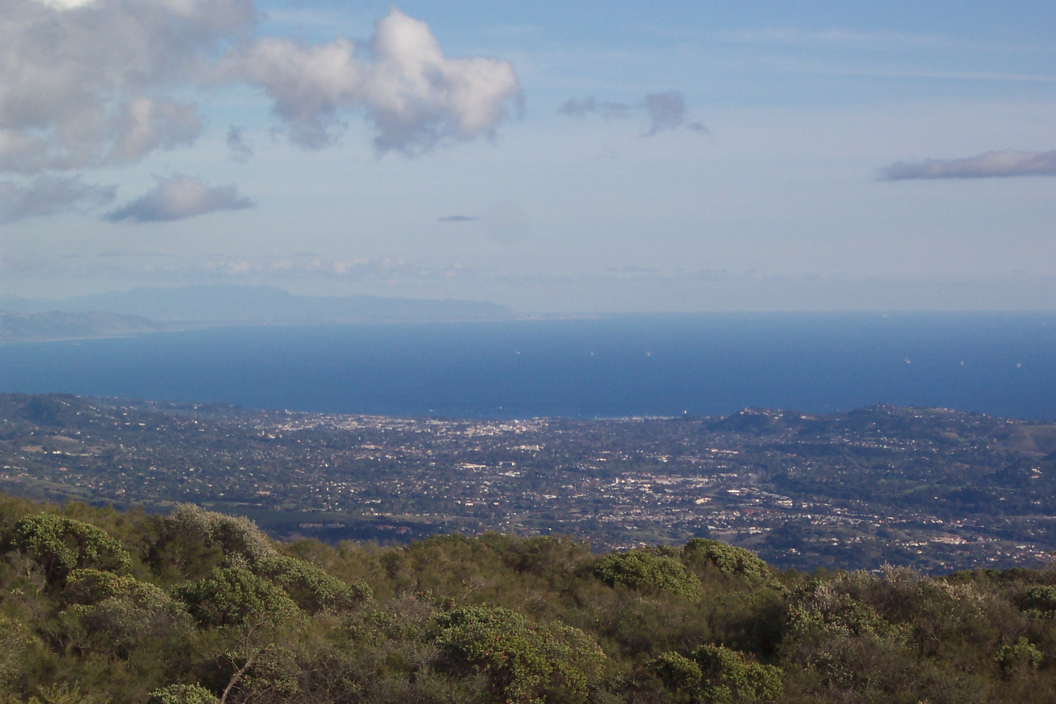 Imagen de Santa Bárbara, California.